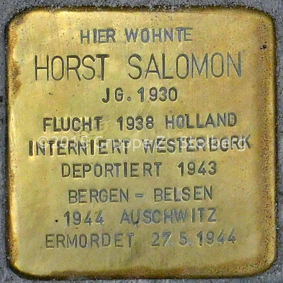 Stolperstein für Horst Salomon verlegt am 18. Dezember 2015